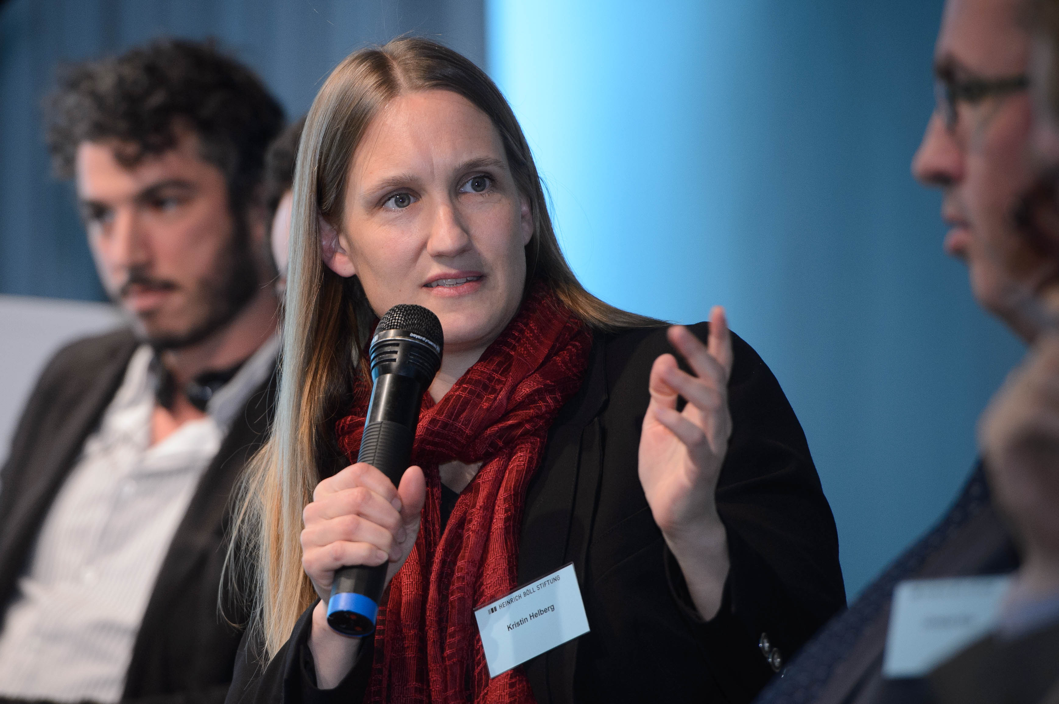 Kristin Helberg